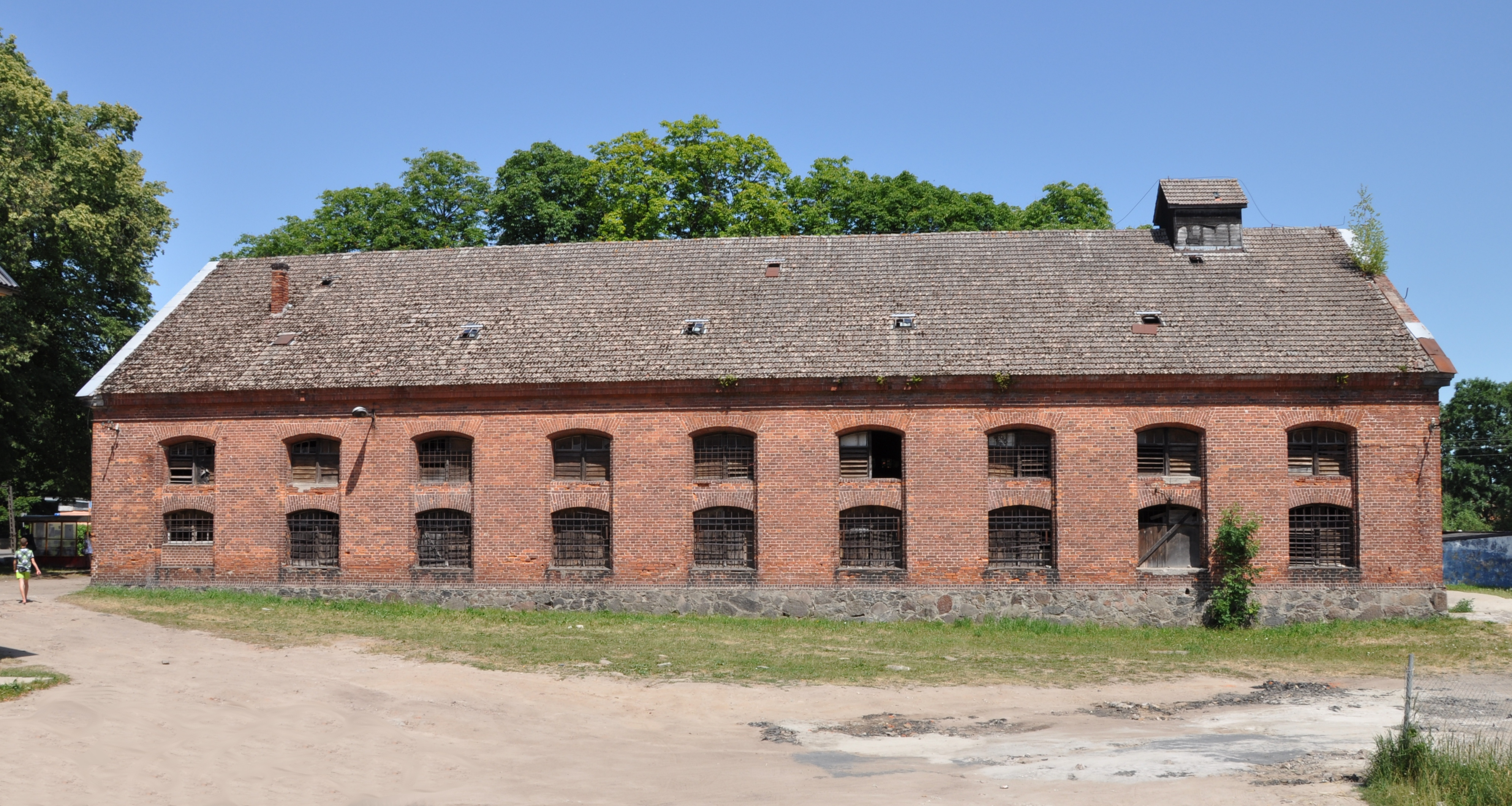 Spichrz przy placu Lipowym 28 w Trzebiatowie – ujęcie od strony południowo-zachodniej